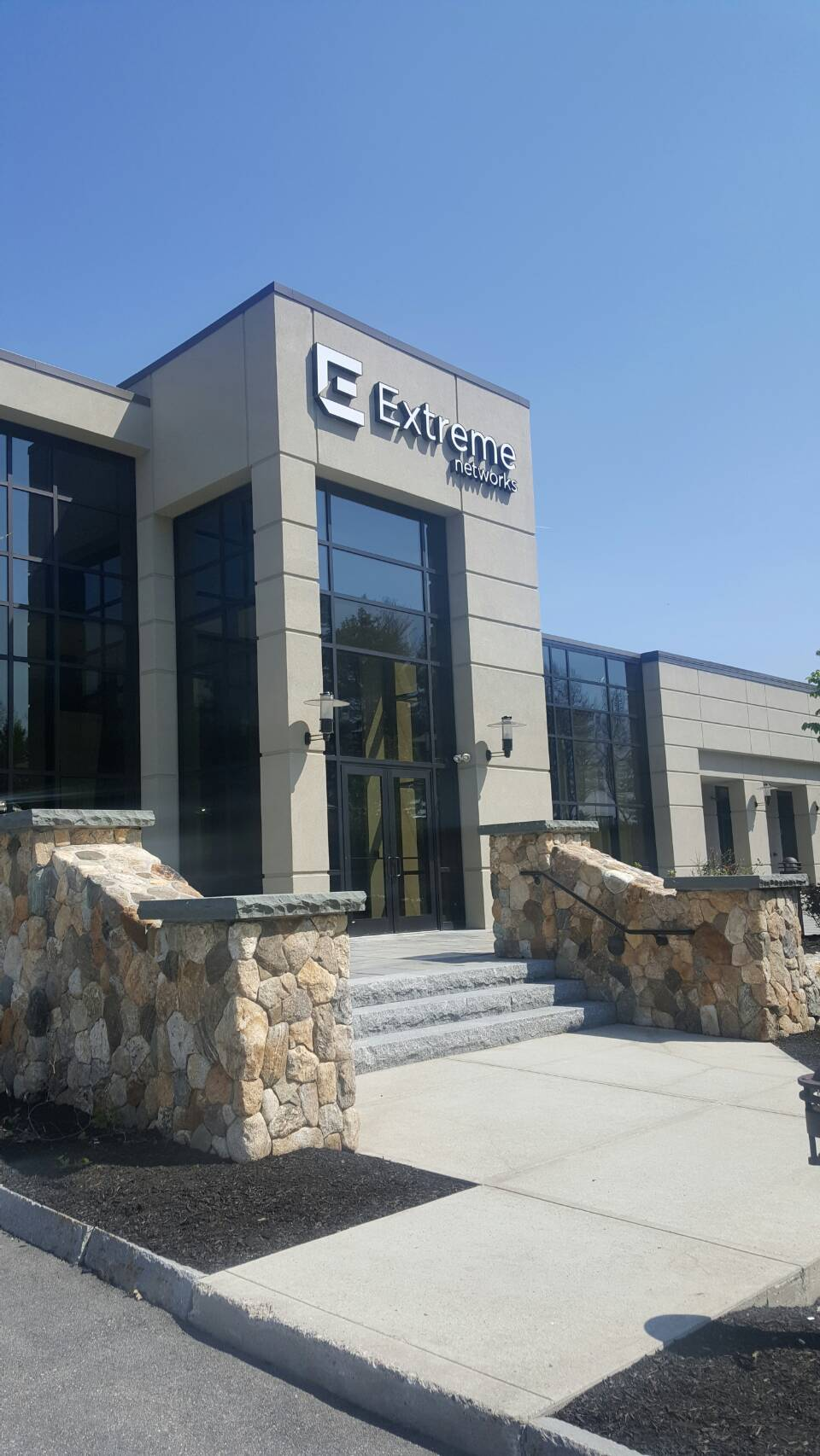 Extreme Networks本社